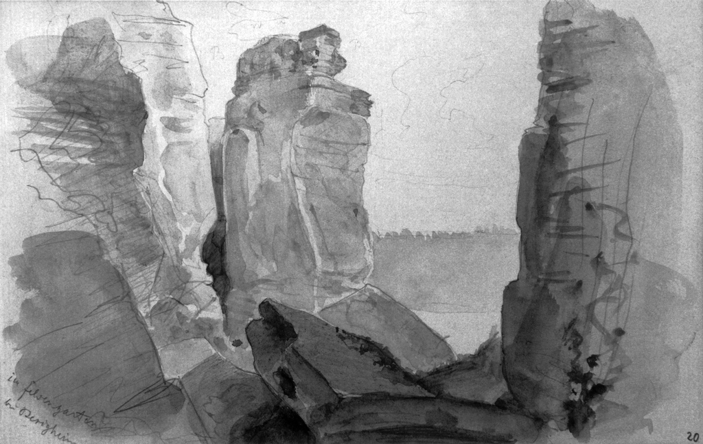 Felsengärten bei Besigheim - Aquarell von General Eduard von Kallee - Skizzenbuch 3 - Sammlung Hagmayer - 12 x 20 cm Hinweis: Heute wird dieses Gebiet als Hessigheimer Felsengärten bezeichnet und zu Hessigheim gerechnet.